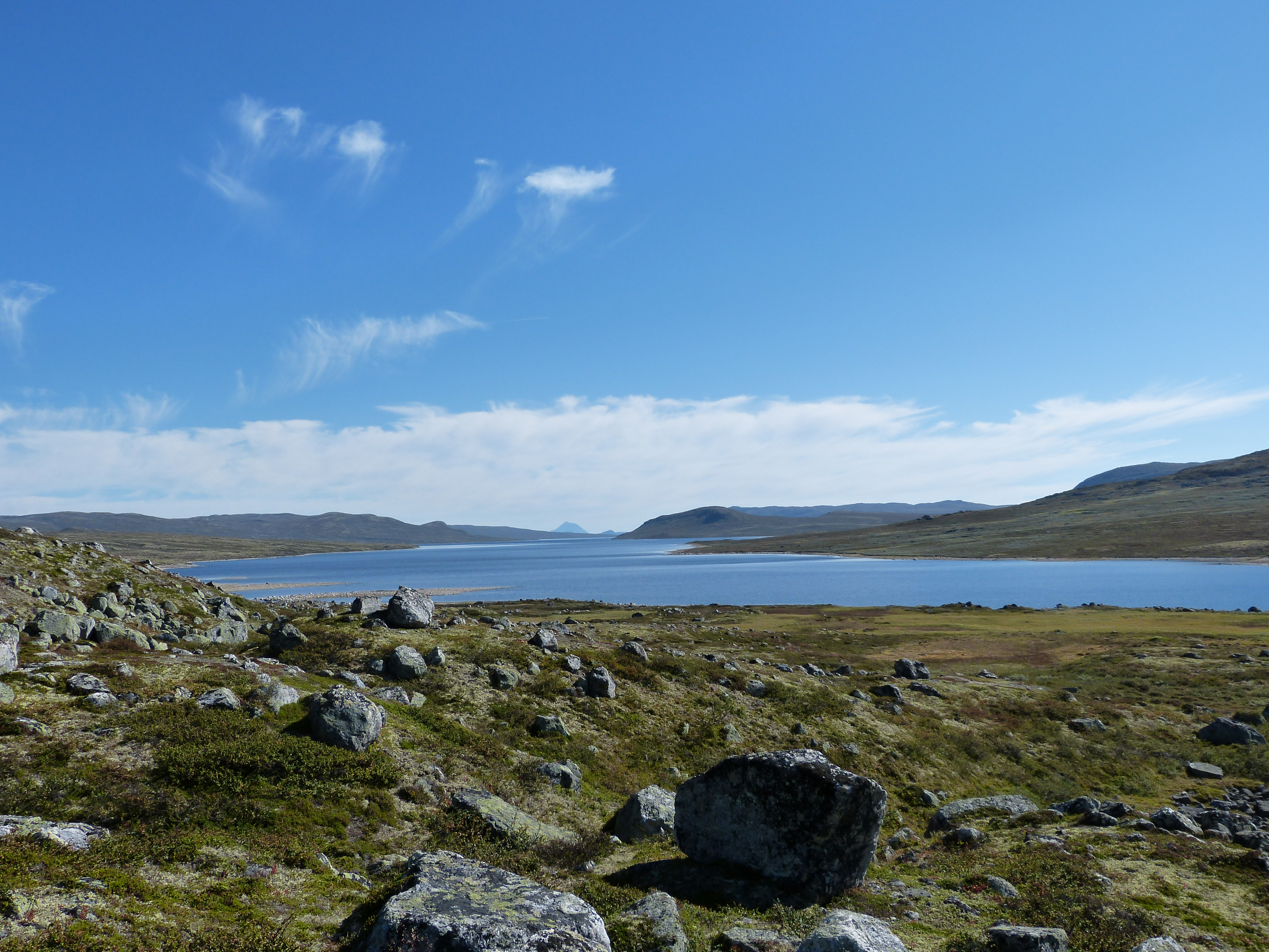 Tag 9. Der See namens Mår. Ganz hinten der Blick auf den Gaustatoppen, der mit 1882 m alle anderen Berge der Vidda überragt. Von hier war er noch drei Tagesetappen entfernt, denn bei jenem Berg lag der Ort Rjukan, das Ziel der Wanderung.